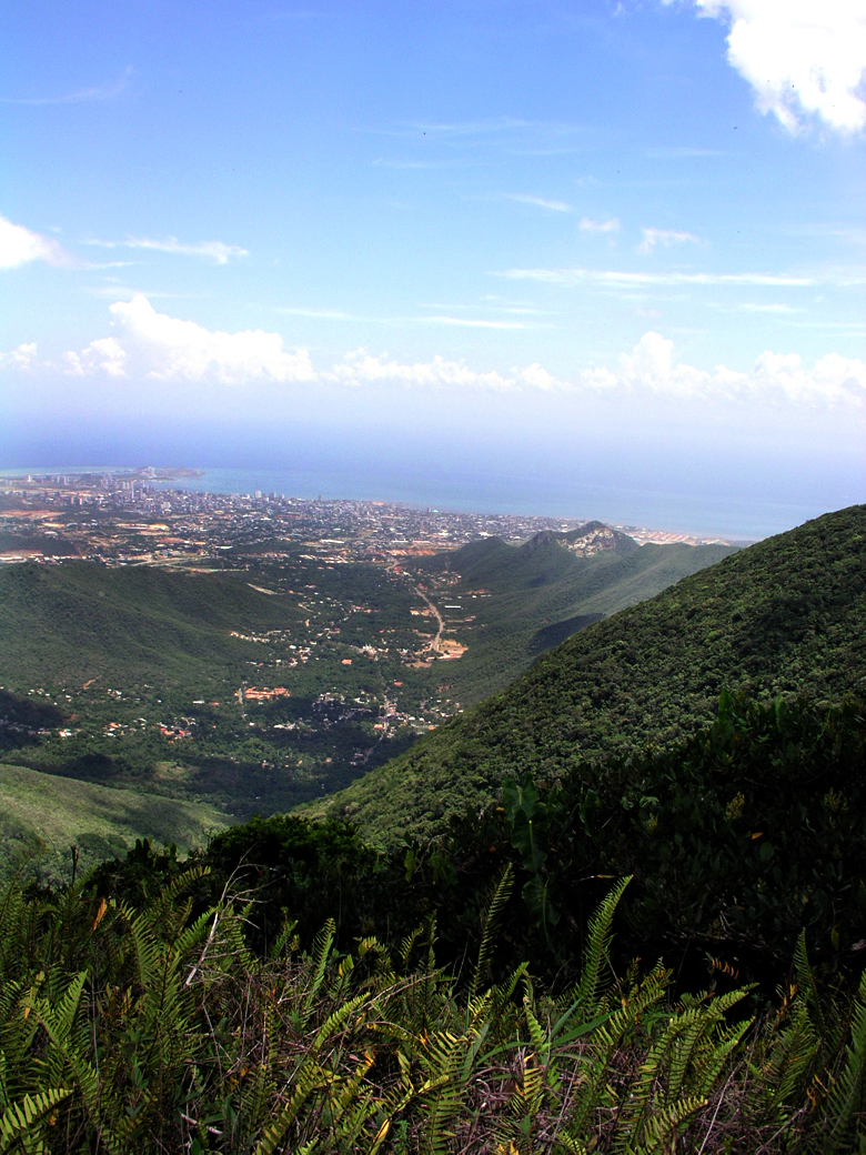 Cerro El Copey, Nueva Esparta, Venezuela.